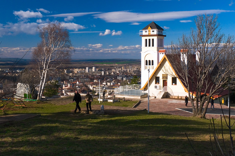 Комплекс Вестителят над Враца